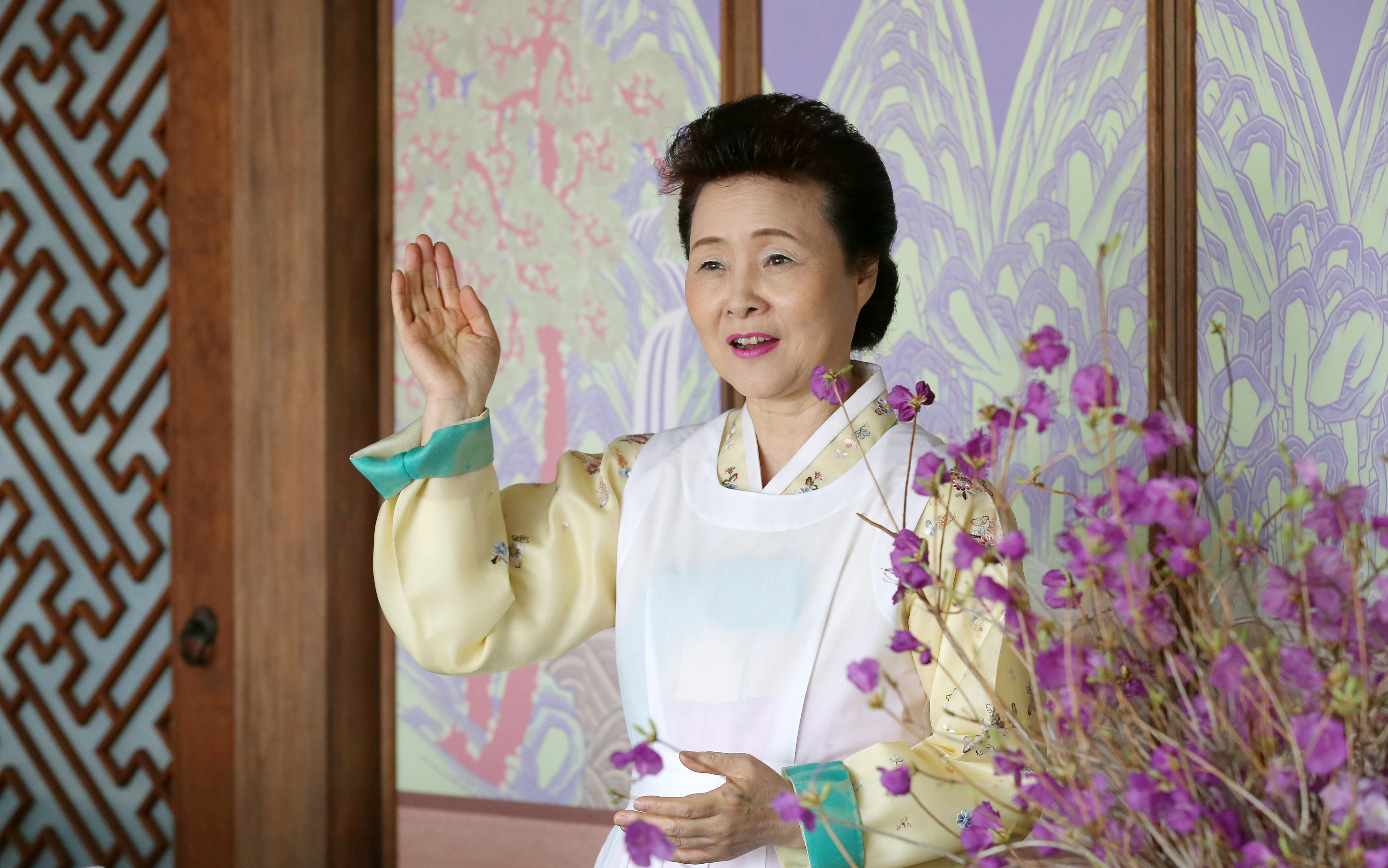 Cooking for Hwajeon(Flower Rice Cake) March 31, 2016 Institute of Traditional Korean Food, Jongno-gu, Seoul Ministry of Culture, Sports and Tourism Korean Culture and Information Service ( Official Photographer : Jeon Han This official Republic of Korea photograph is being made available only for publication by news organizations and/or for personal printing by the subject(s) of the photograph. The photograph may not be manipulated in any way. Also, it may not be used in any type of commercial, advertisement, product or promotion that in any way suggests approval or endorsement from the government of the Republic of Korea. 윤숙자 교수의 화전(花煎) 만들기 2016-03-31 한국전통음식연구소 문화체육관광부 해외문화홍보원 코리아넷 전한